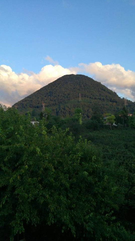 Şayib Tepesi, Ulubey, Ordu (Güzelyurt Mahallesi)